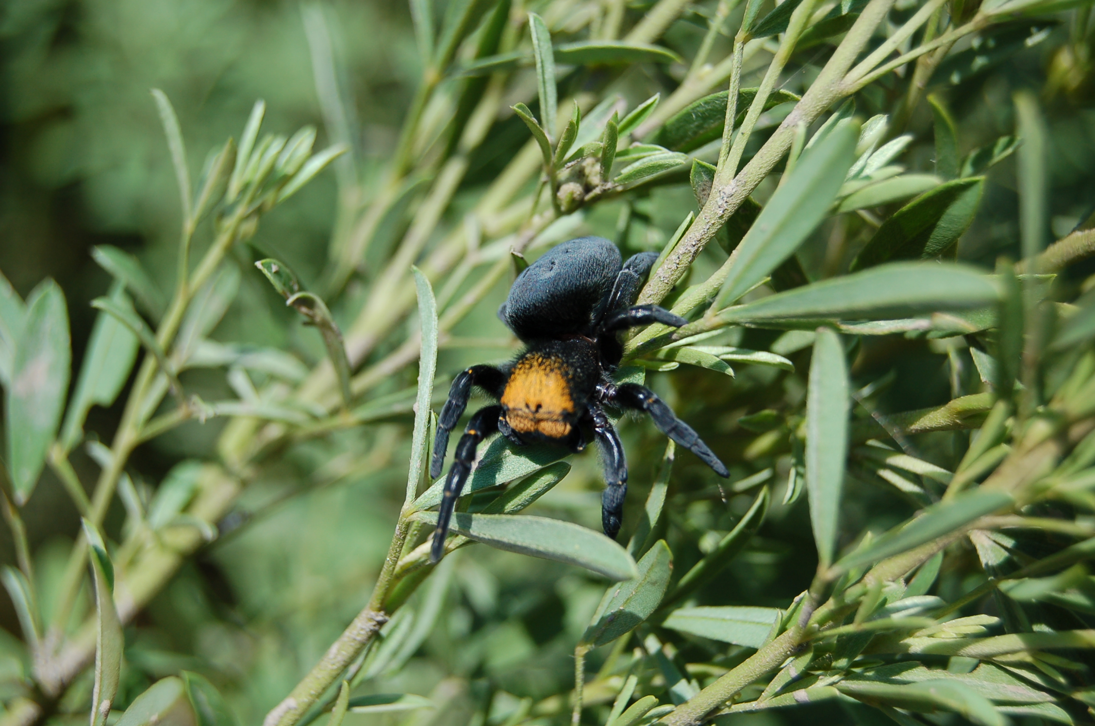 Stepník moravský